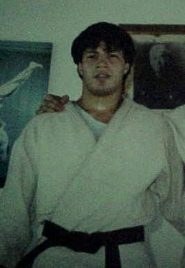 Orlando Céspedes, (Posadas, Provincia de Misiones, 8 de noviembre de 1966) es un deportista argentino que compitió en yudo y representó a Paraguay en los Juegos Olímpicos. Participó en dos Juegos Olímpicos de Verano entre los años 1988 y 1992.